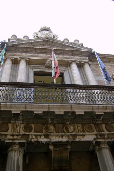 Facultad de Traducción e Interpretación de Granada front. By Antonio San Martín Pizarro - (Granada, Spain) Feel free to use it!